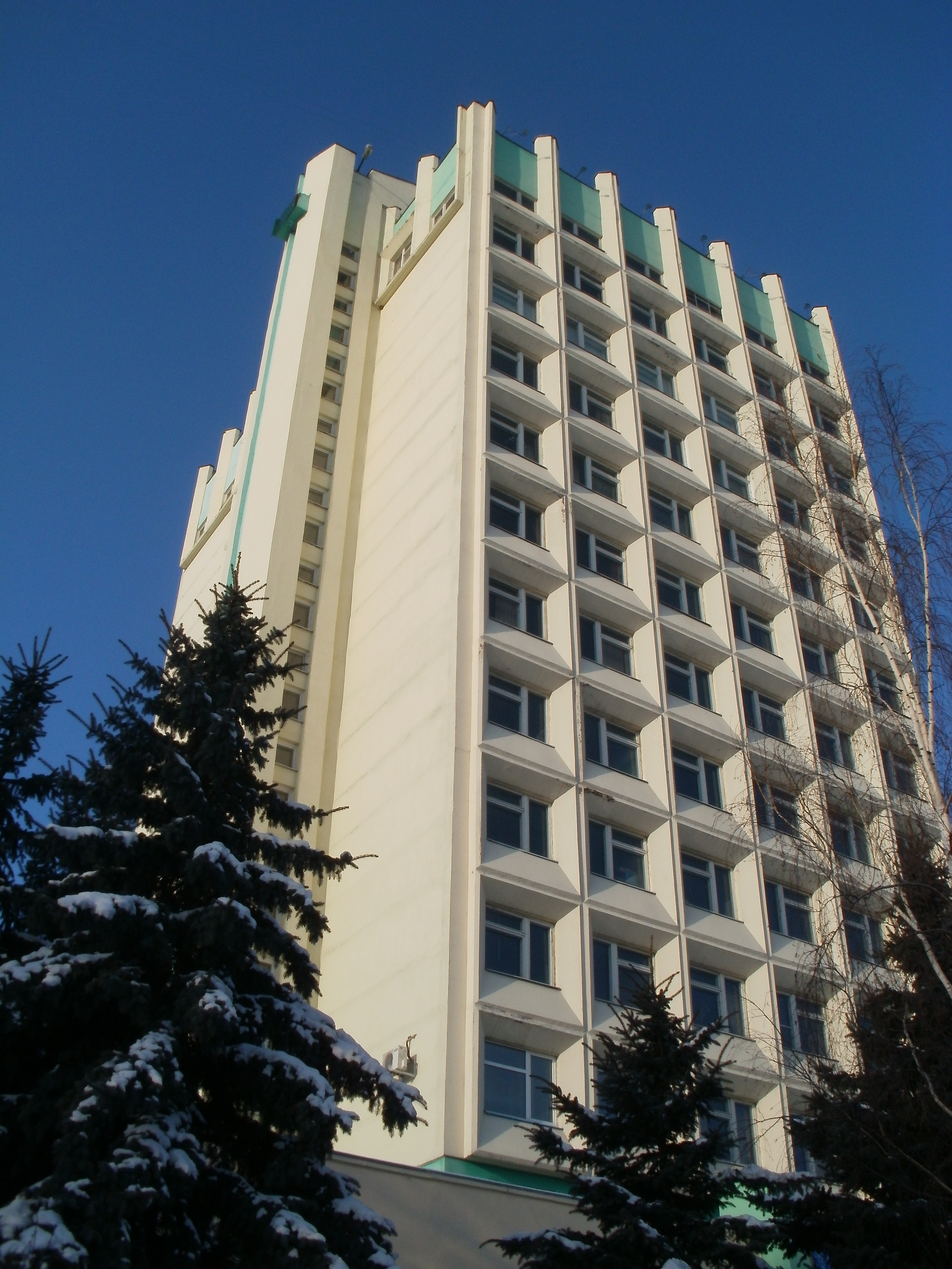 Беларуская (тарашкевіца): Інстытут Лесу. Горад Гомель, вуліца Пралетарская